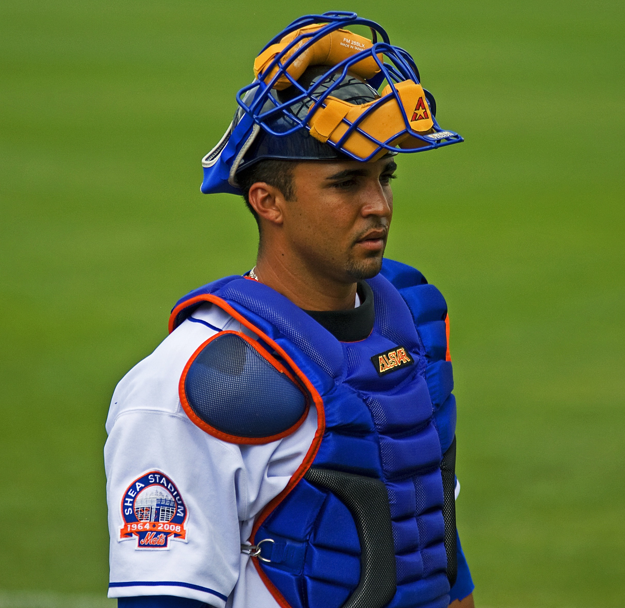 Gustavo Molina